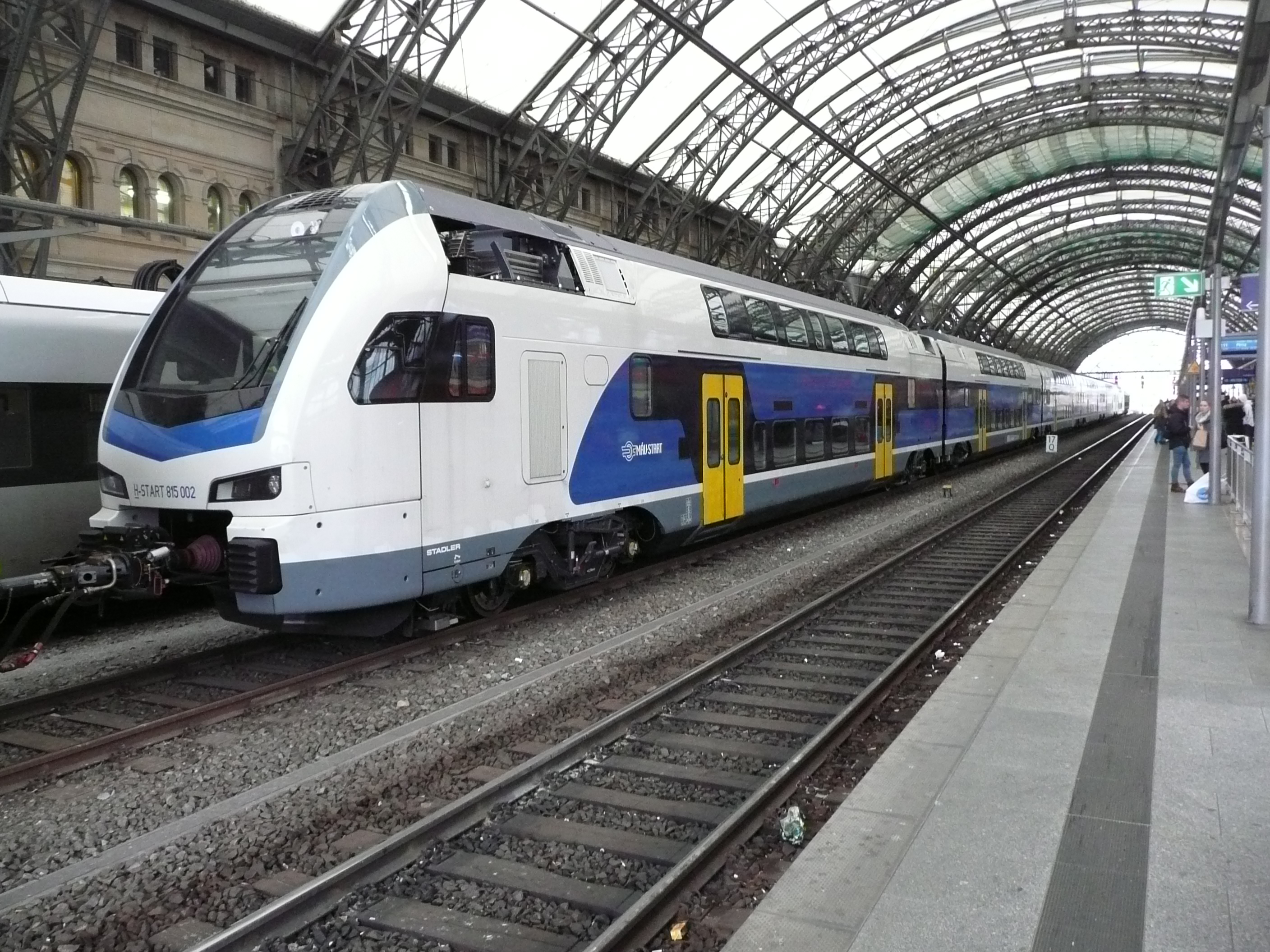 Stadler KISS3 815 002 der MÁV auf Überführungsfahrt in Dresden Hbf